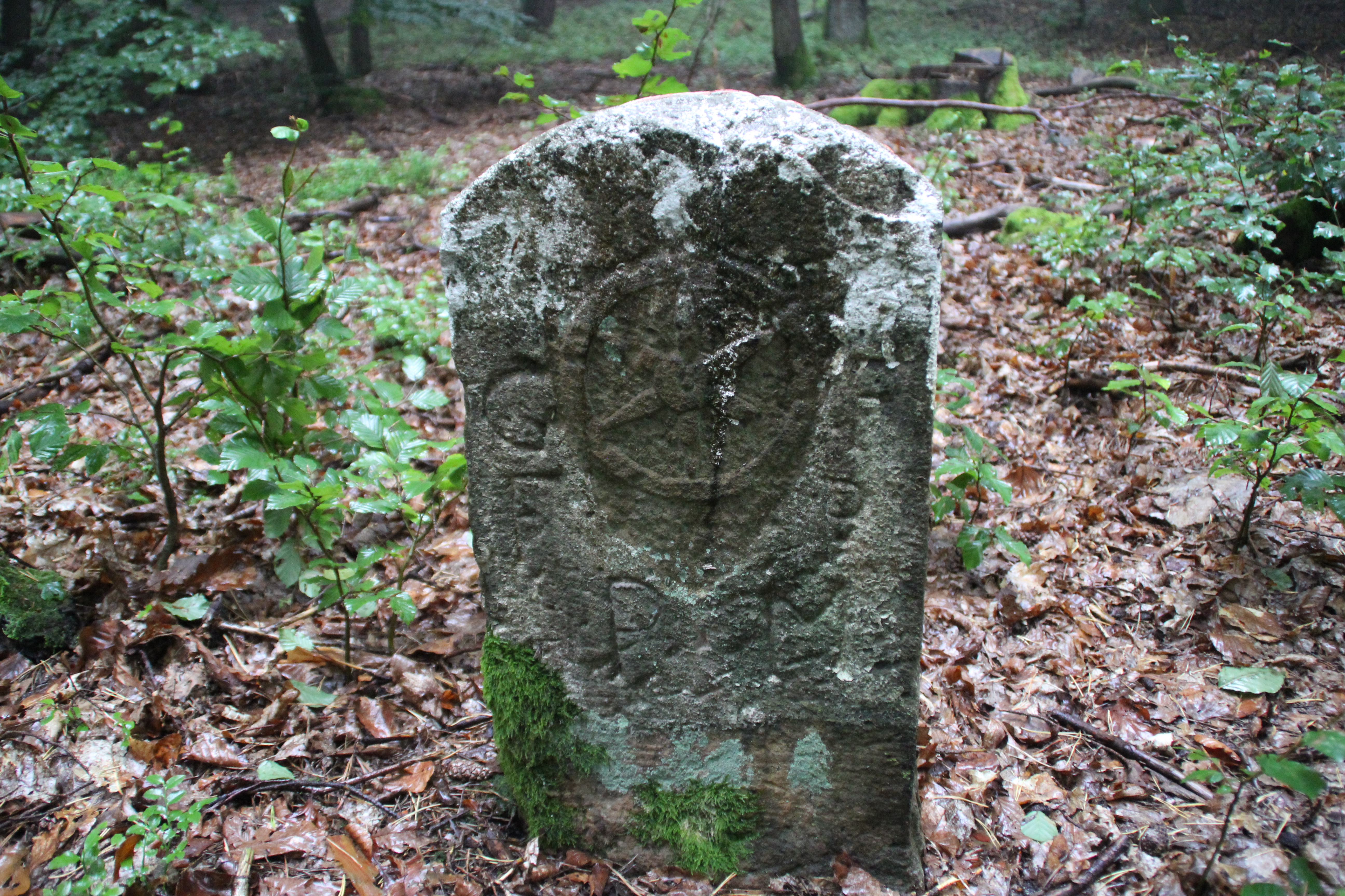 Grenzstein 122 auf der Stempelhöhe zwischen Hörstein und Mömbris